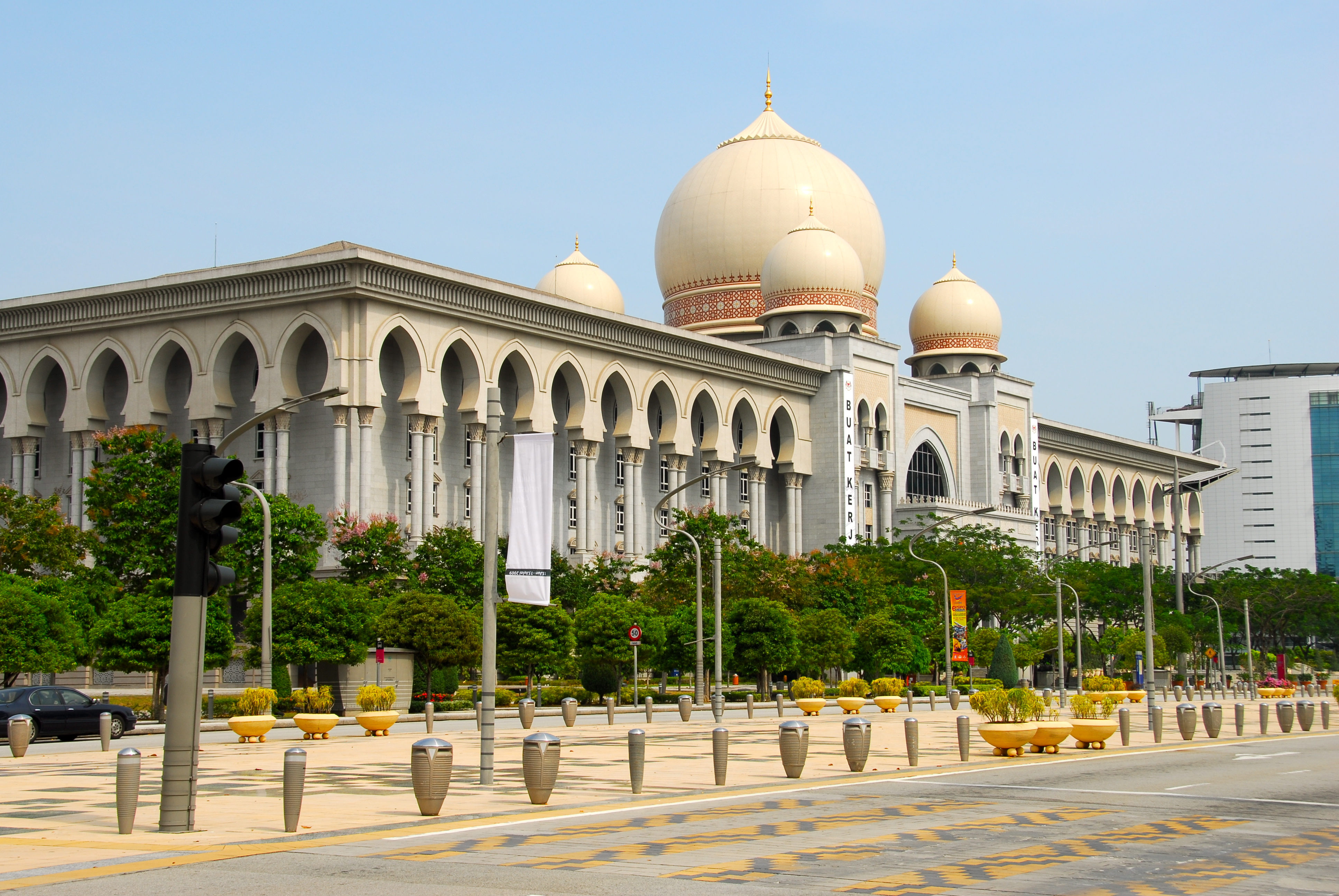 Putrajaya